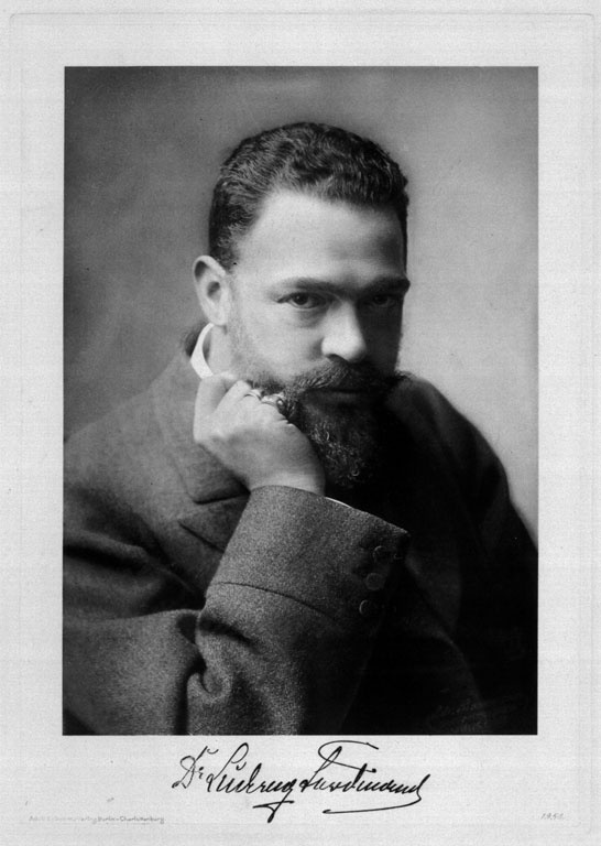 принц Людвіг Фердинанд Баварський